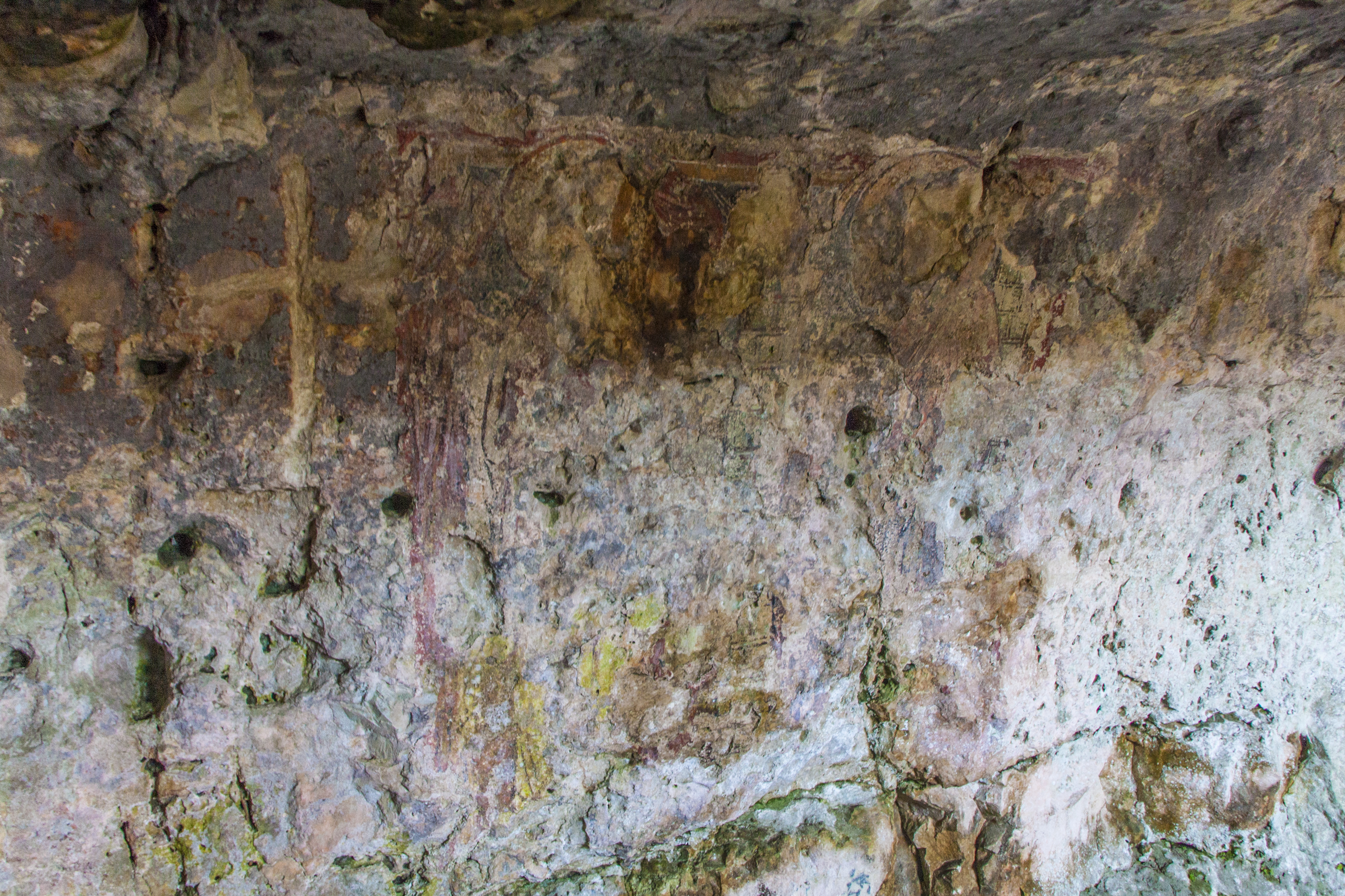 Chiesa di San Nicola (Cava d'Ispica)